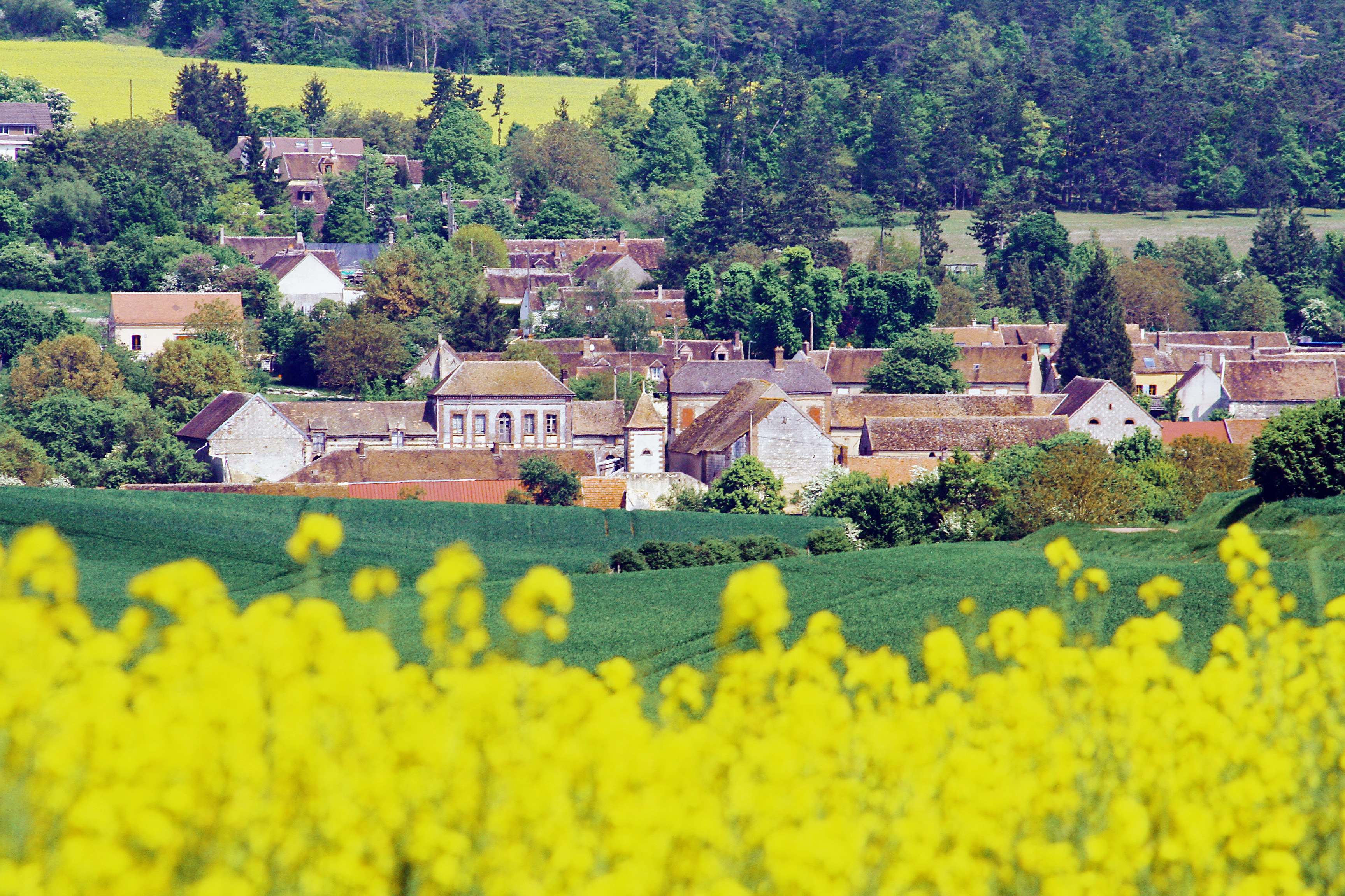 Le village de la Postolle vu depuis le ravin des Poissons sur la route de Voisines